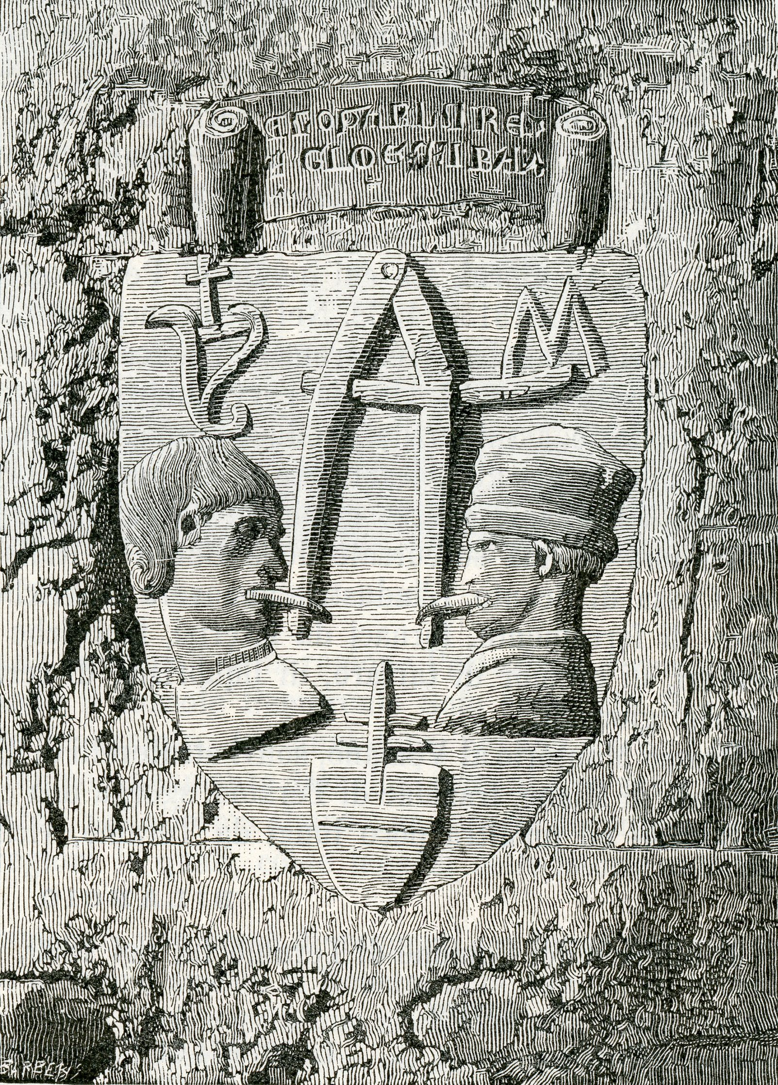 Teramo: lapide con la scritta A lo parlare agi mesura (xilografia di Barberis 1898).